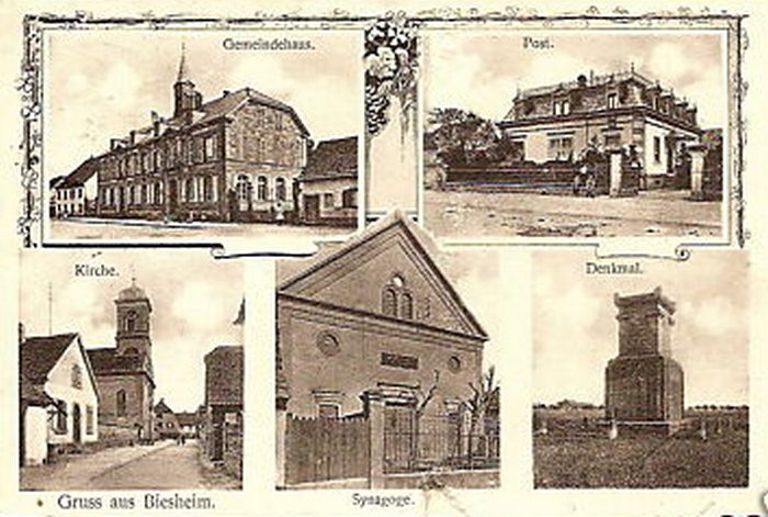 Ansichtskarte von Biesheim im Elsass